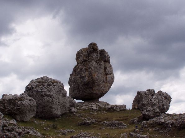 Beschreibung: Chaos de Nîmes le Vieux Datum: Juli 2004 Fotografin: Anna-Katharina Schmid Lizenz: GNU FDL